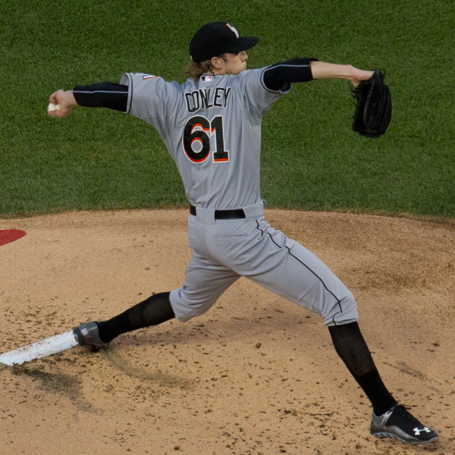 Adam Conley